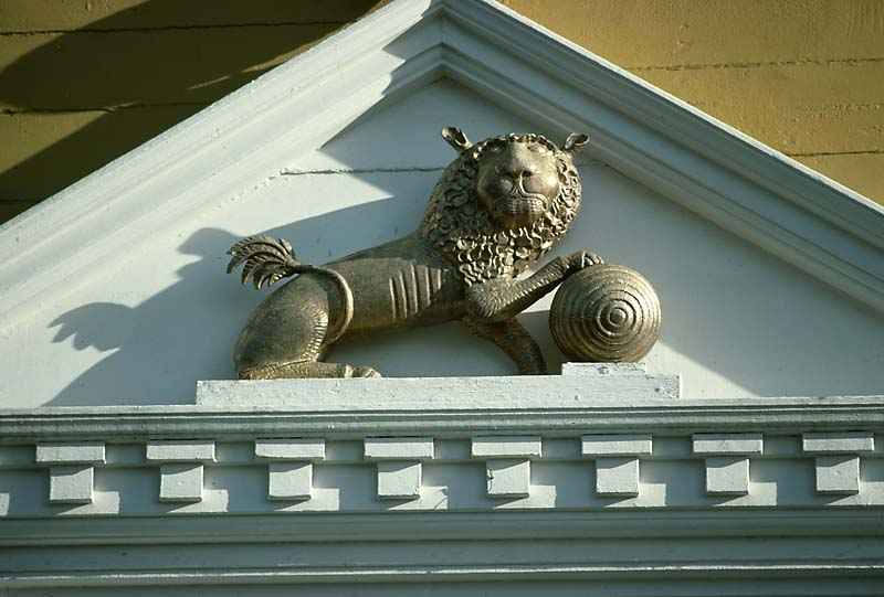 Portal med lejon.; Bruksherrgård; Byggnadsverk; Skulpturer; Slott och herrgårdar; Övrigt